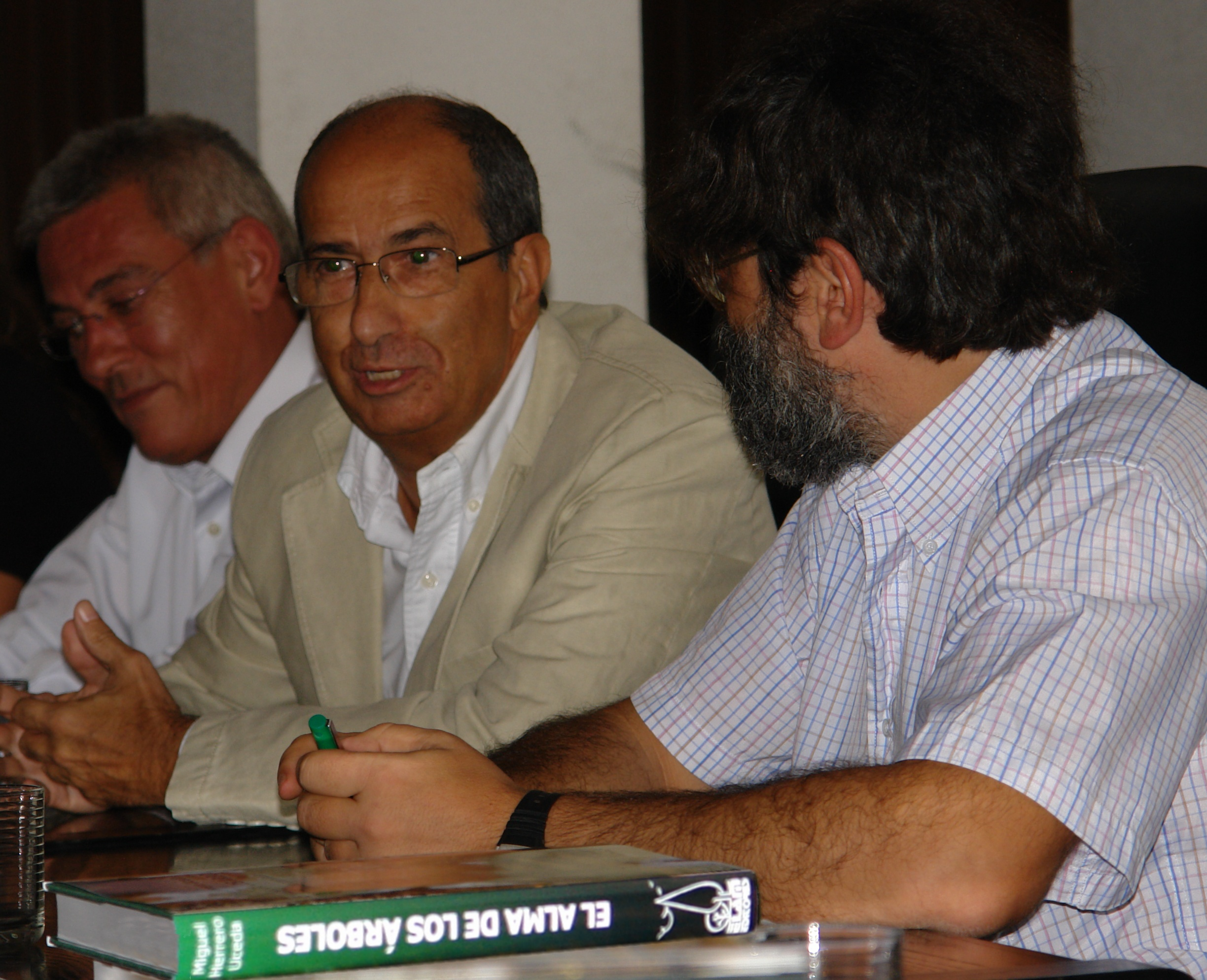 Fernando Argenta en la presentación del libro El alma de los árboles, con Javier Sánchez, presidente de la Fundación Más Árboles (a la izquierda) y el naturalista Miguel Herrero Uceda (derecha). Facultad de Biología, Universidad Complutense de Madrid. 2 de noviembre de 2008. Fernando Argenta ha sido un gran defensor del medio ambiente y desde sus programas siempre encontraba un espacio para mostrar su amor a la naturaleza.